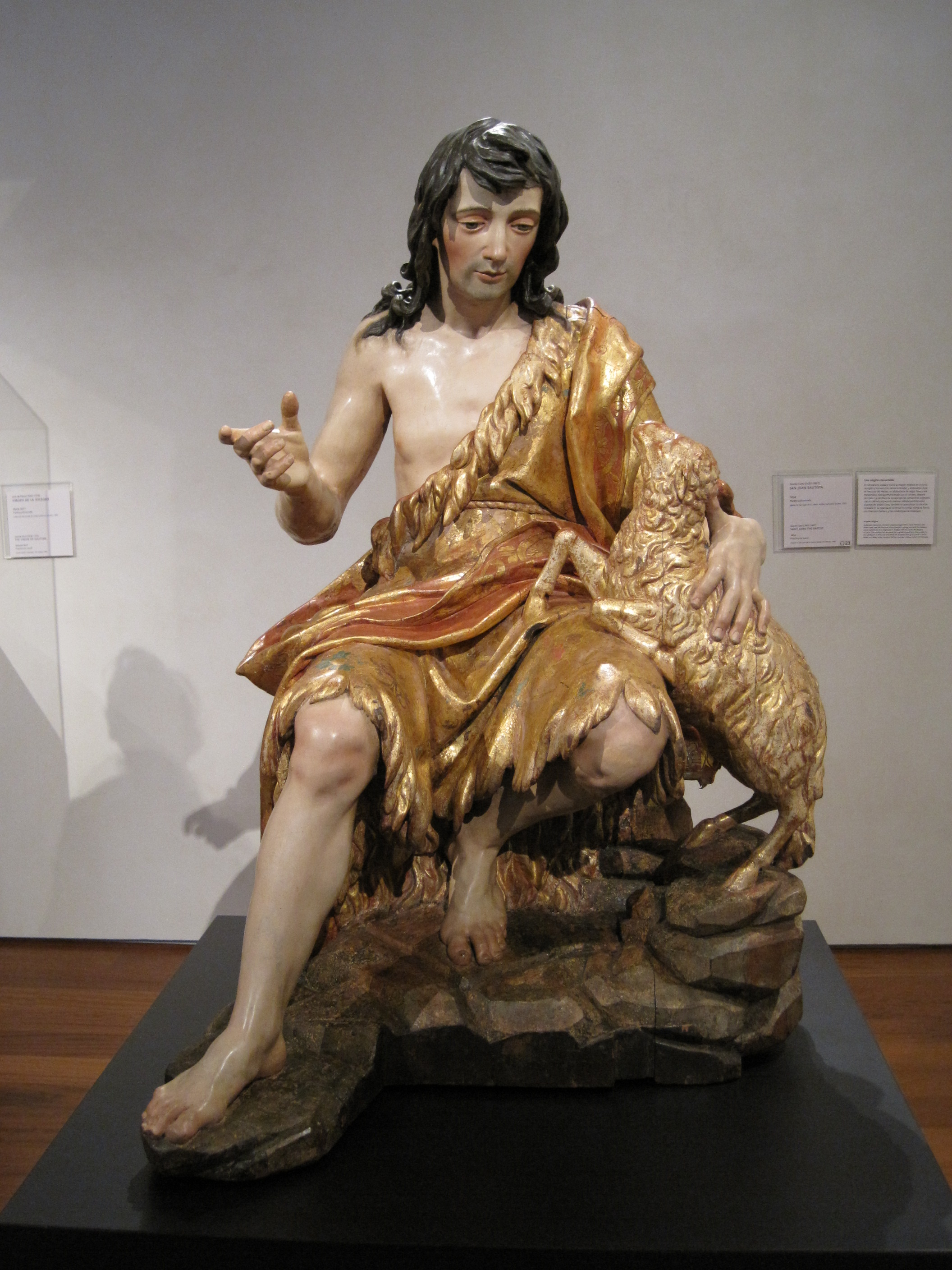 San Juan Bausita (a partir de 1634), obra de Alonso Cano. Procede de la iglesia de San Juan de Palma en Sevilla. Museo Nacional Colegio de San Gregorio, Valladolid (España).